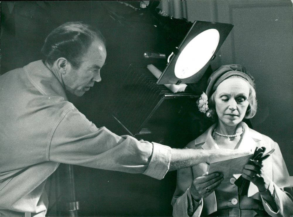 Regissör Torgny Anderberg och skådespelare Inga Tidblad under inspelningen av filmen Pärlemor. Liknande bild infördes i Svenska Dagbladet 1961-07-12 sid 3 (